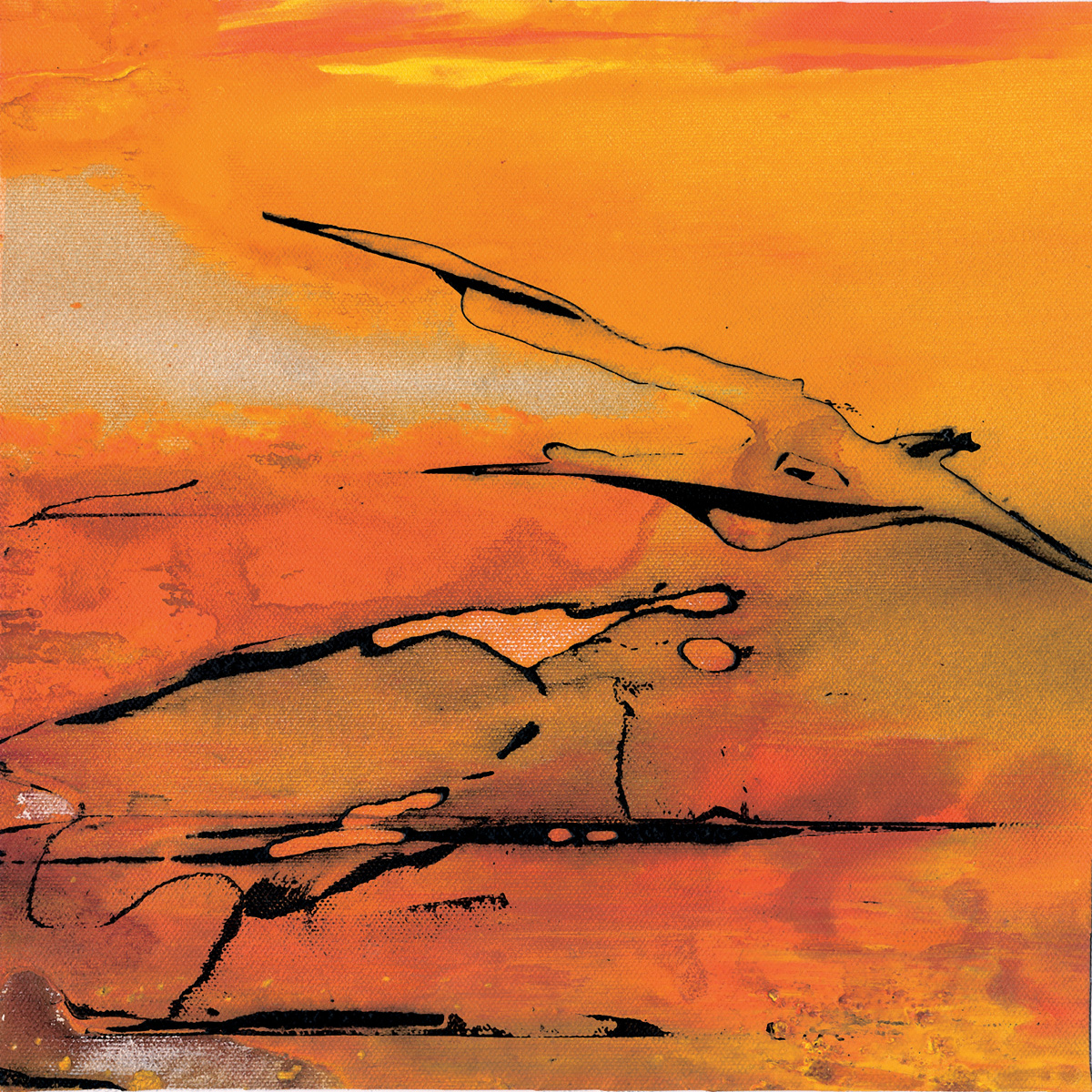 Eva Maria Enders, Colore di Pompei, 2004 Mischtechnik auf Leinwand, 60 x 60 cm